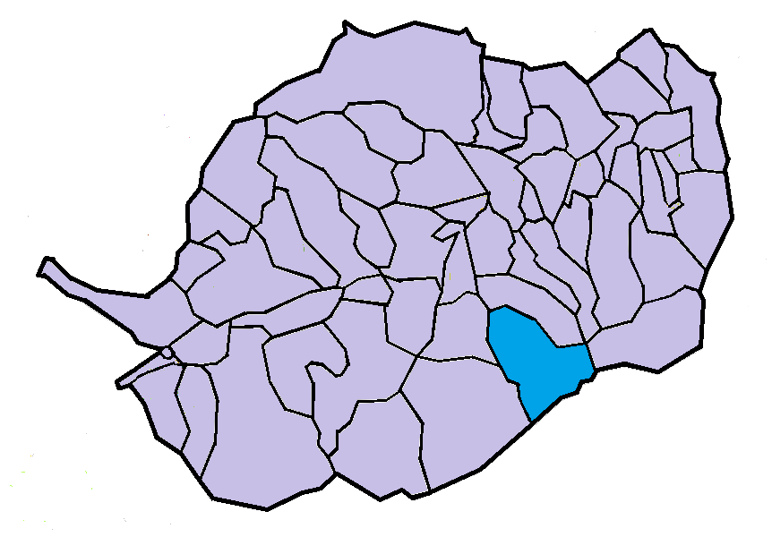 Castell de Vernet en el Conflent, a partir del mapa municipal del Conflent de lliure disposició adaptat al Nomenclàtor toponímic aprovat el 2007